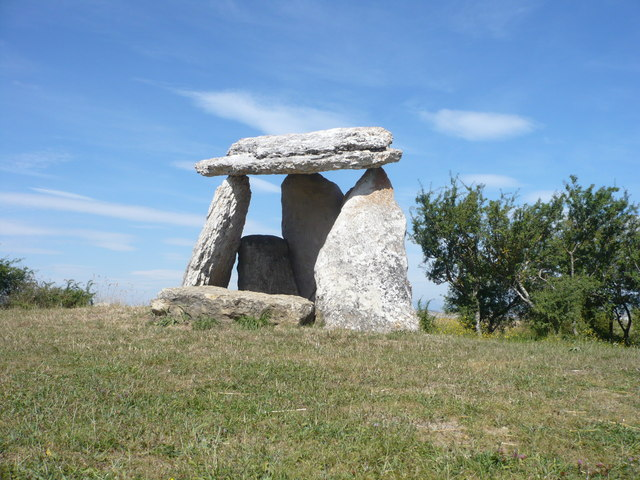 Arrizalako Sorginetxe trikuharria